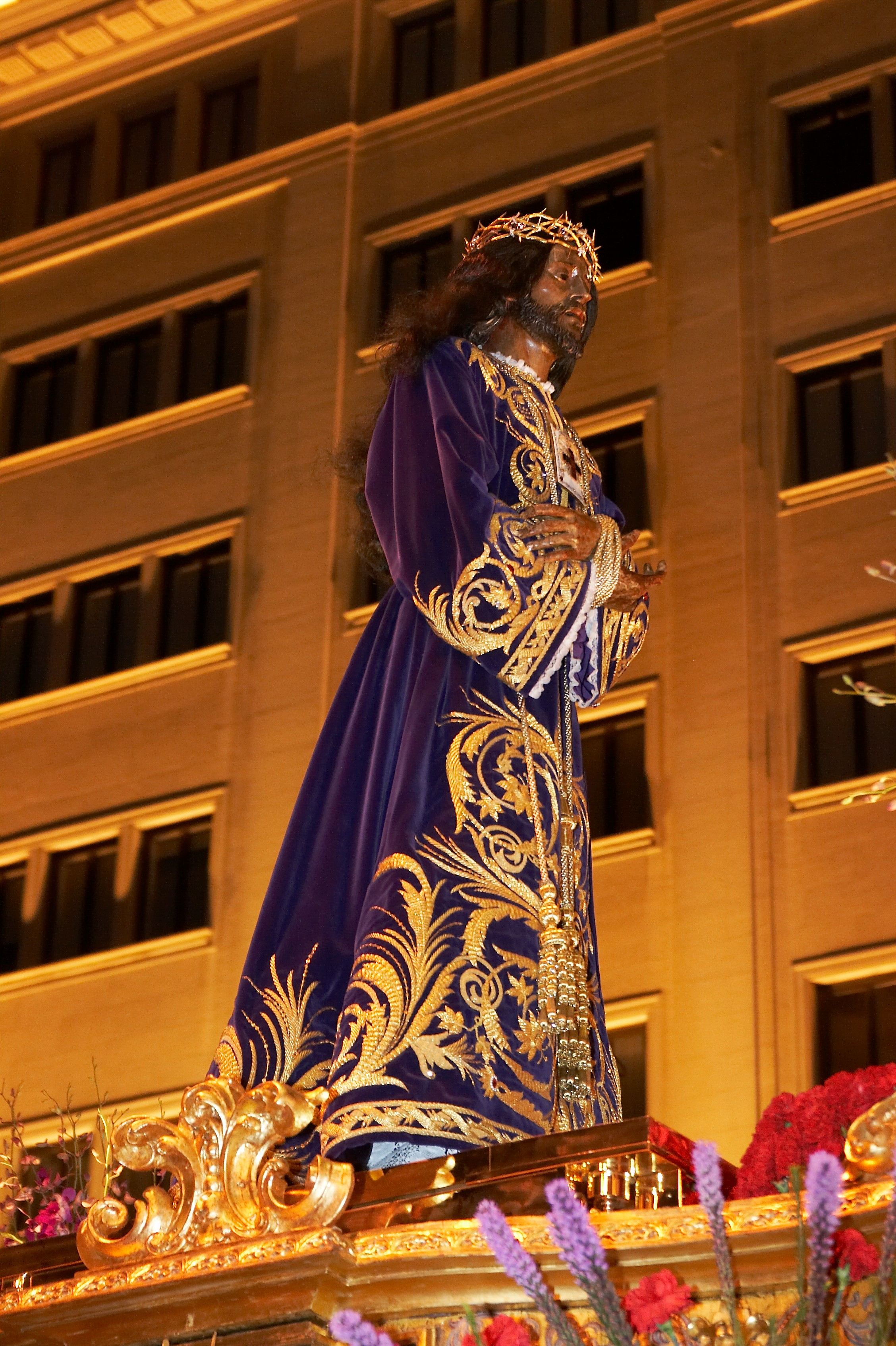 Procesión Jesús Nazareno de Medinaceli, Madrid.